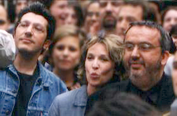 Les Nuls photographiés en juin 1999 devant les locaux de la chaine Comédie lors de la dernière de La Grosse Émission. Photo sous GFDL prise par Utilisateur:Jgremillot.